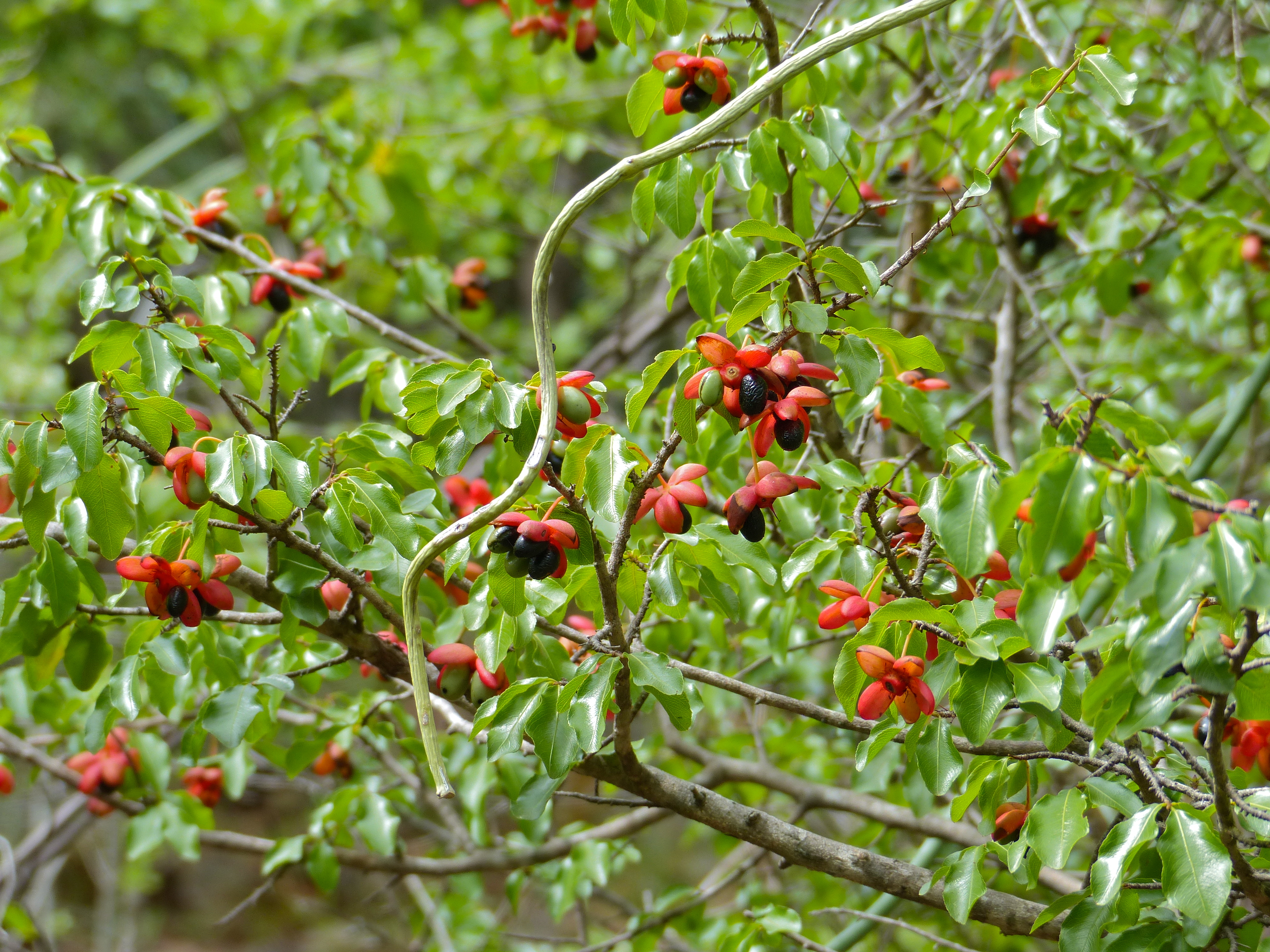 Punda Maria Camp, Kruger NP, SOUTH AFRICA